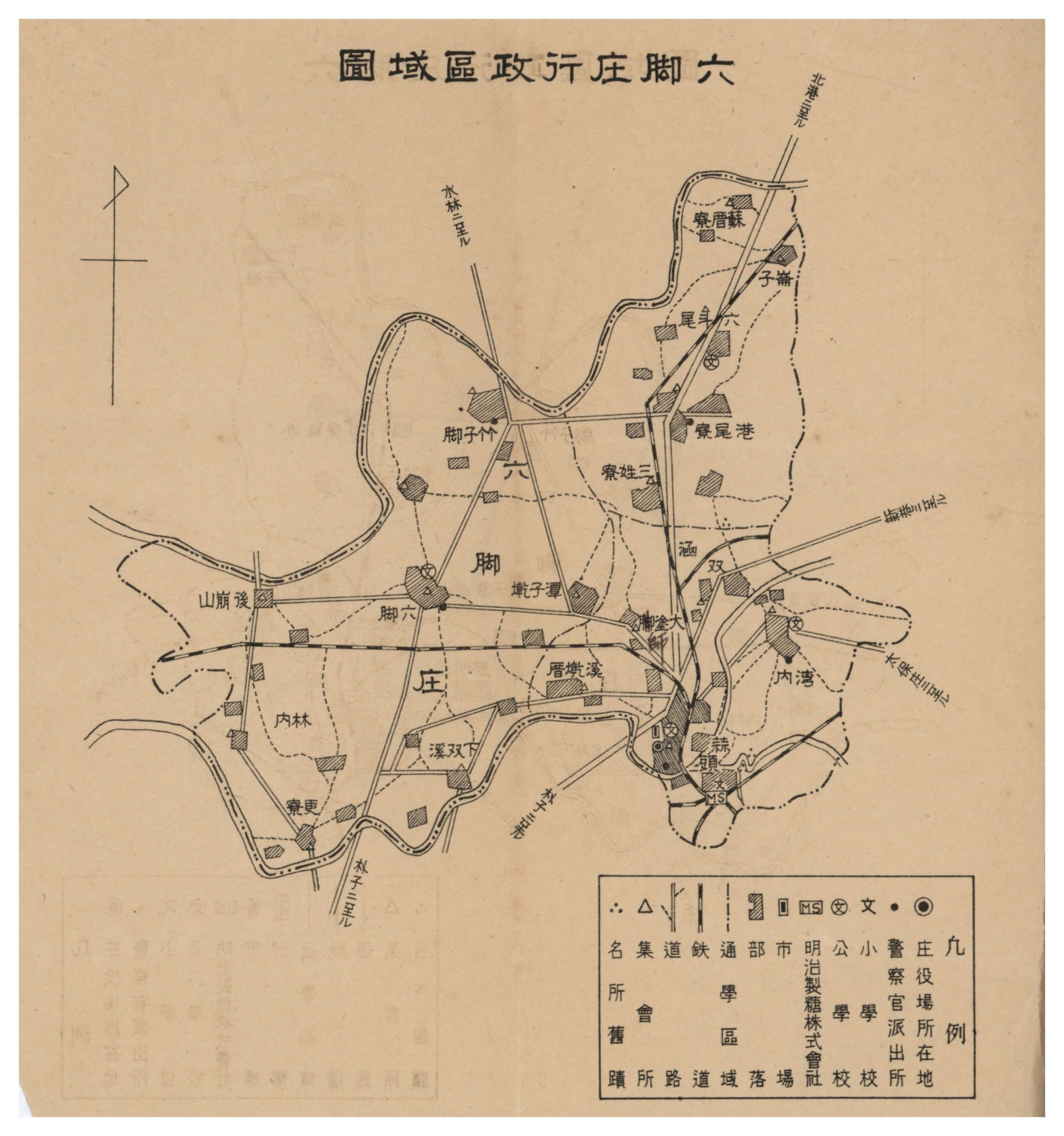 六腳庄為台灣日治時期行政區，隸屬台南州東石郡。圖上標示聚落、道路、行政機關等設施。